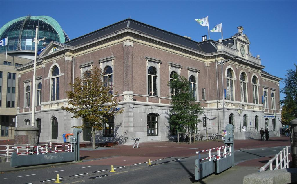 Voormalig Beurs-en waaggebouw, nu Openbare Bibliotheek, in Leeuwarden. Wirdumerpoortsbrug.